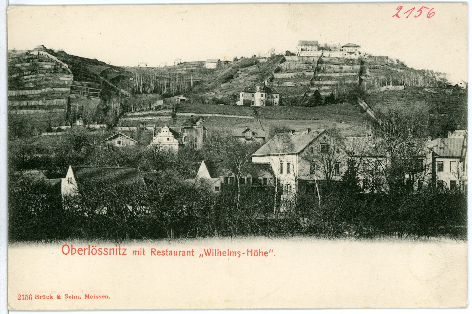 Oberlößnitz; Restaurant Wilhelms Höhe This postcard is from publisher Brück & Sohn in Meißen ( postcard has a unique number 02156 and is available in a higher resolution at the publisher. This images was uploaded in a cooperation project between Wikipedians and the publisher.